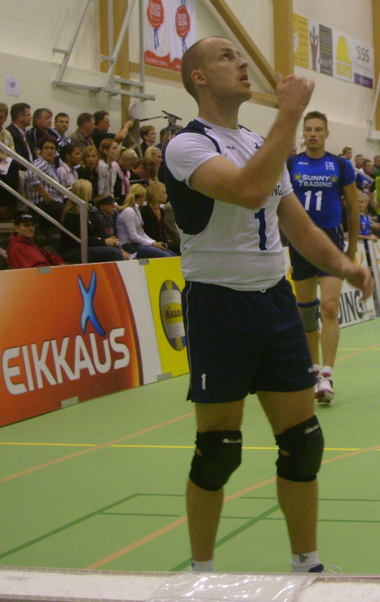 Tapio Kangasniemi 31. elokuuta 2007 pelatussa A-maaottelussa Espanjaa vastaan Laihialla